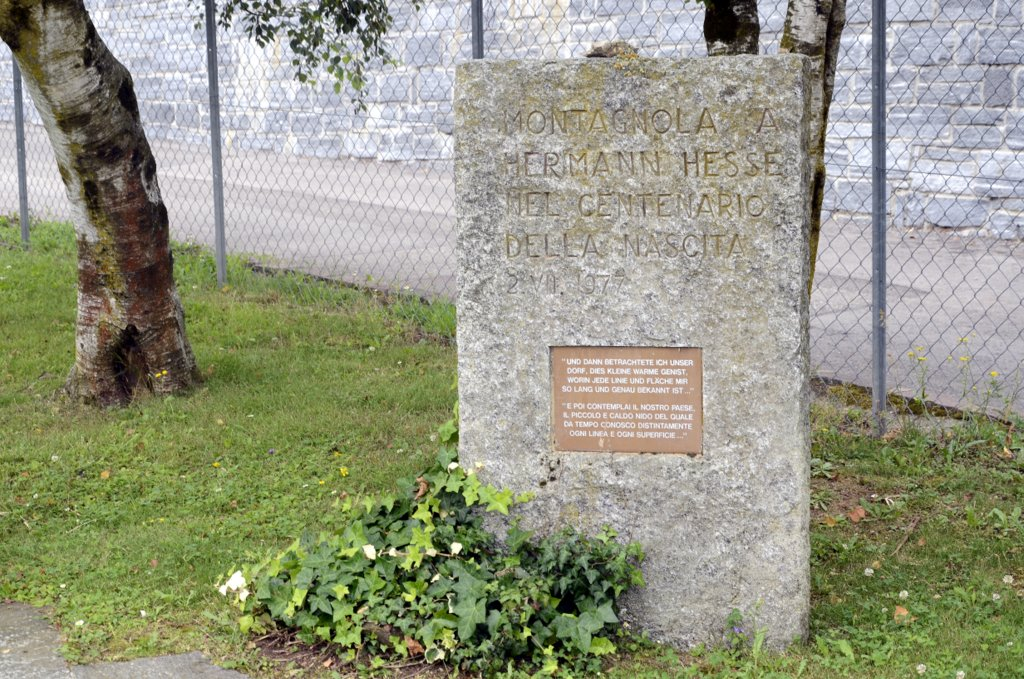 Lapide commemorativa del 100° anniversario della nascita di Hermann Hess